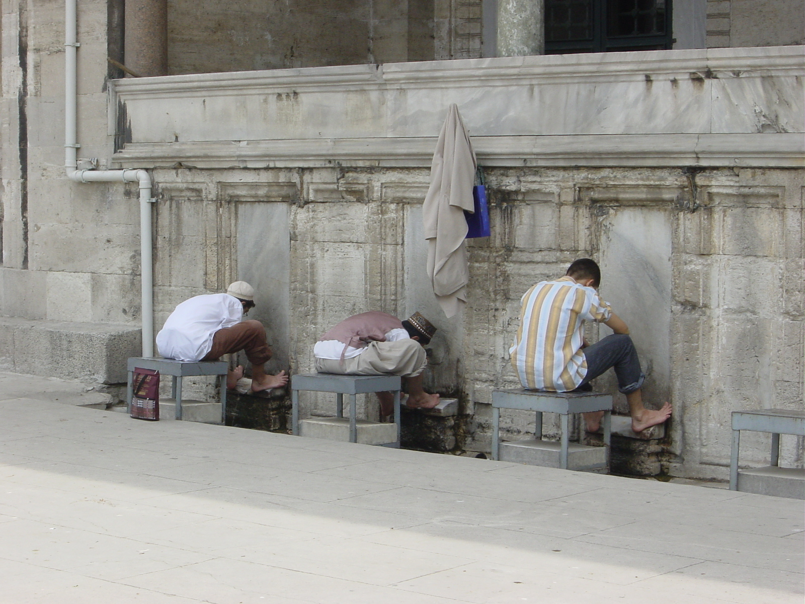 Tre fedeli mussulmani, qui ritratti sul fianco sinistro della Moschea di Solimano il Magnifico ad Istanbul intenti alle abluzioni a viso, braccia e piedi, prescritte dal rituale islamico prima della preghiera. L'immagine è stata scattata di venerdì, il giorno del culto pubblico per i mussulmani. Foto di: Giovanni Dall'Orto, 26-5-2006.